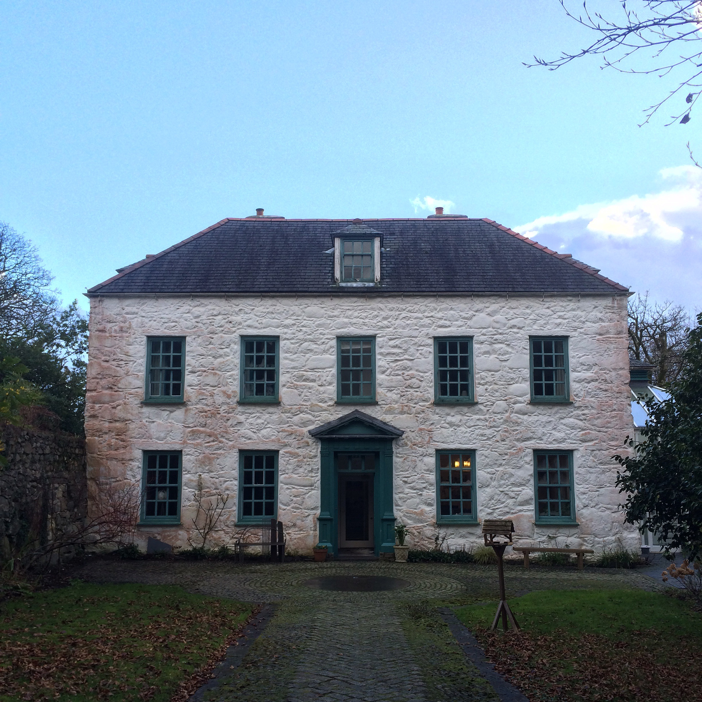 (Canolfan Ysgrifennu) Tŷ Newydd, Llanystumdwy